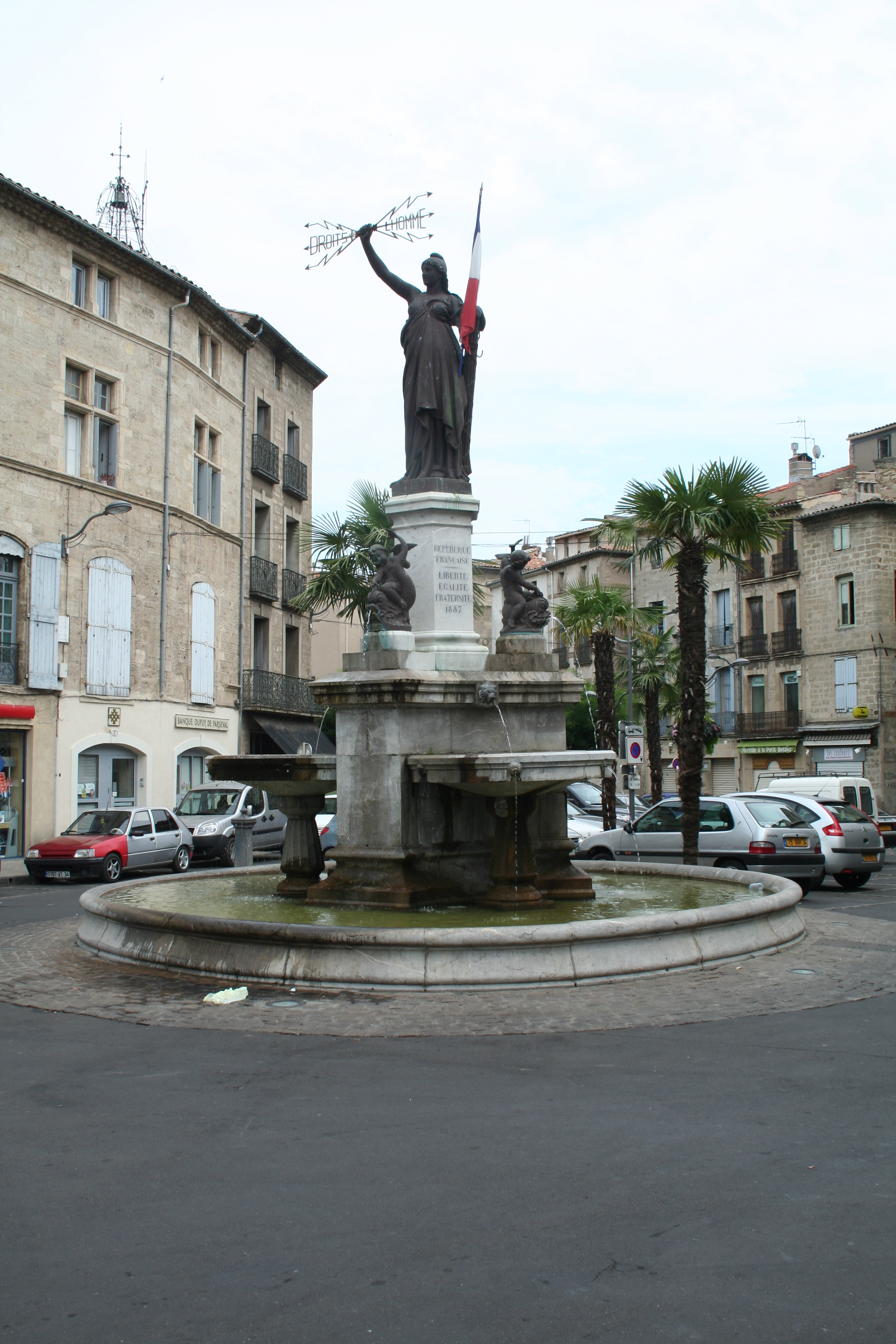 Pézenas (Hérault) - Statue de Marianne sur les allées Jean Jaurès.